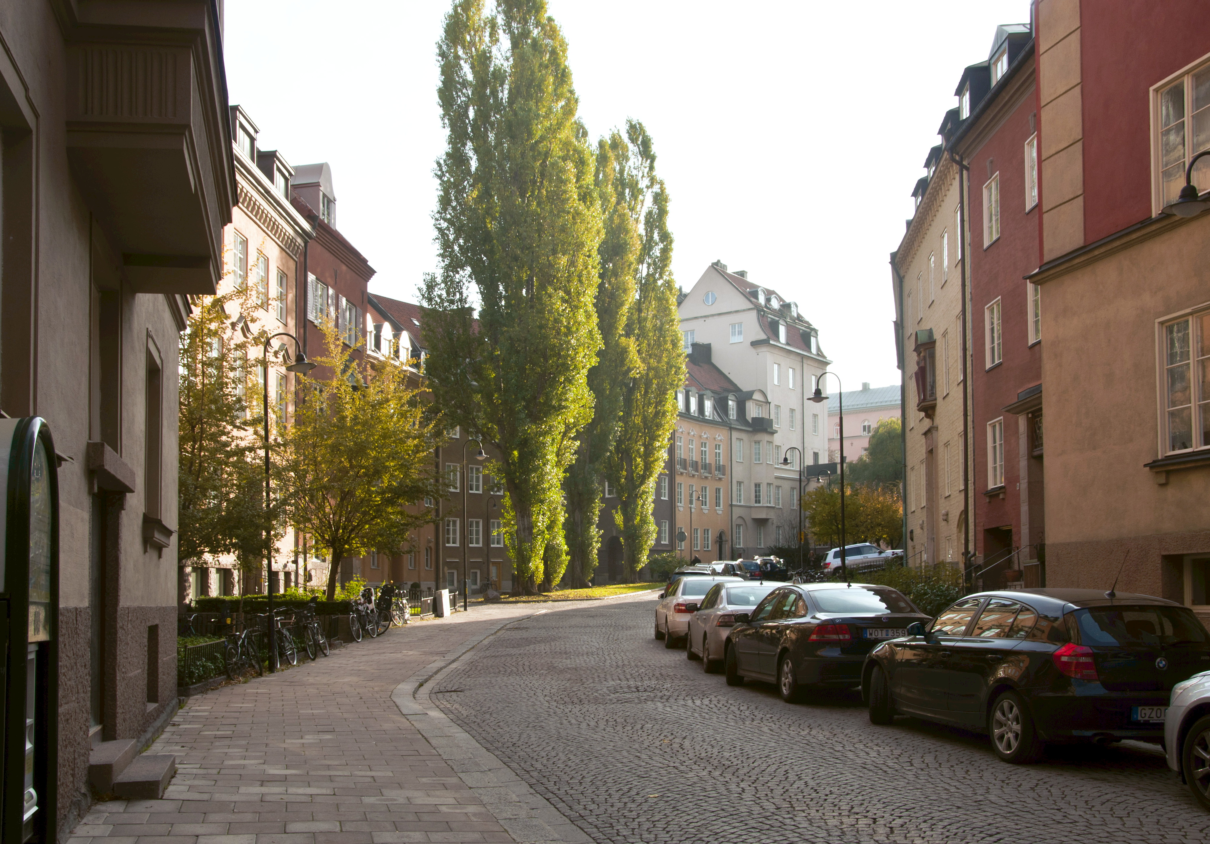 Tysta gatan